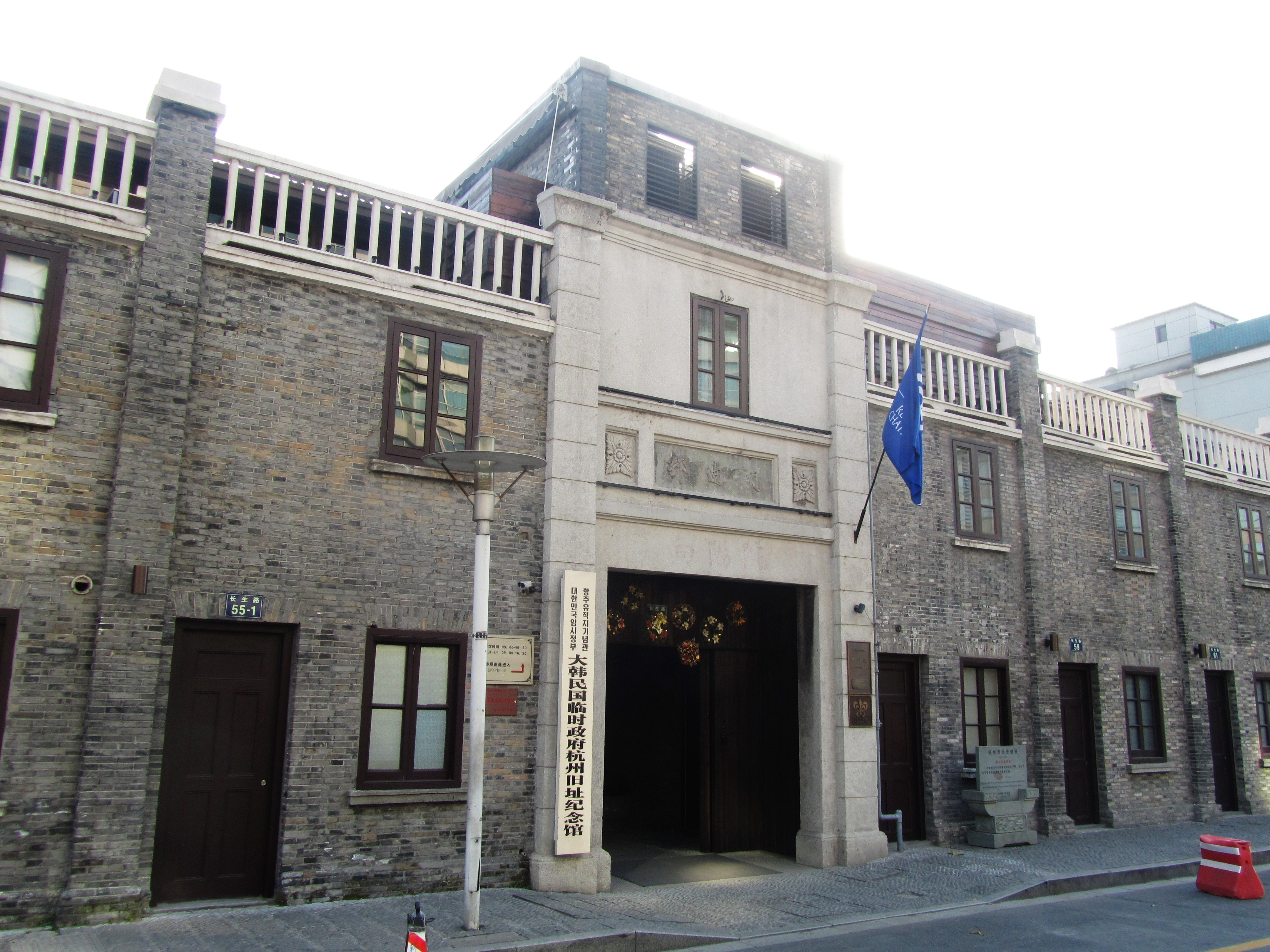 杭州湖边村建筑群，杭州市历史建筑之一，北侧沿长生路大门。